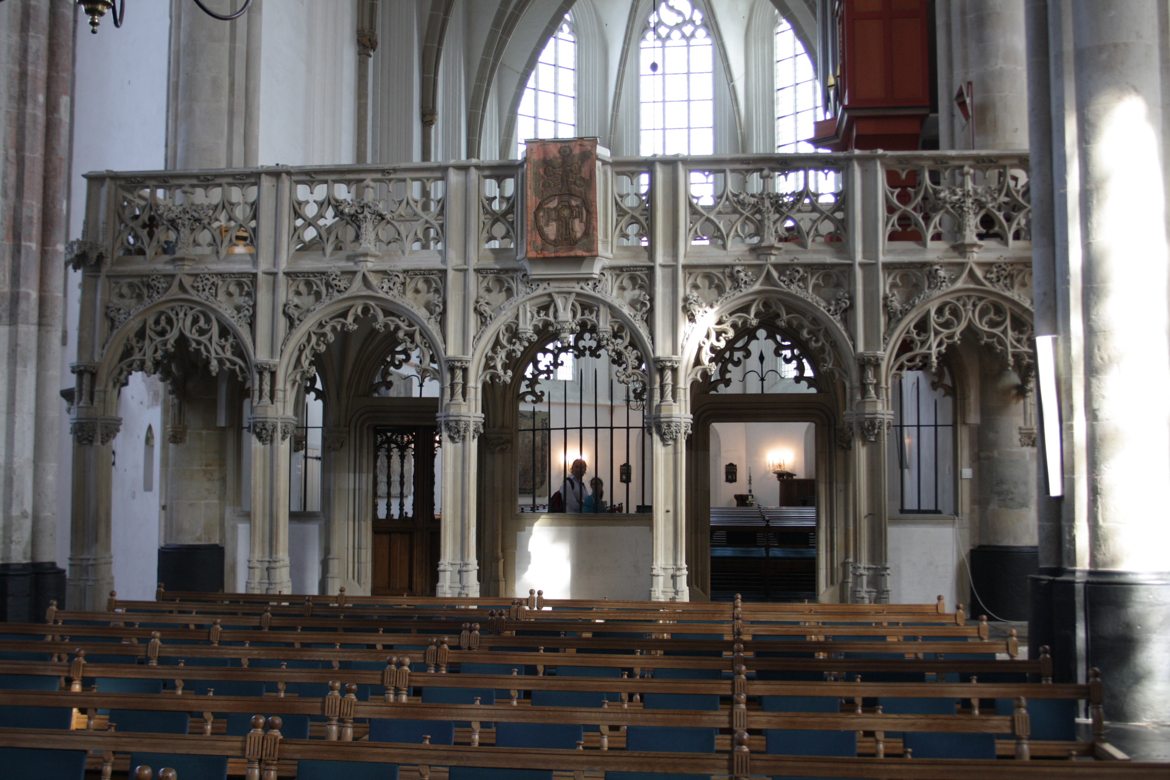 Amersfoort, Sint Joriskerk; Doksaal of scheiding tussen schip en priesterkoor.